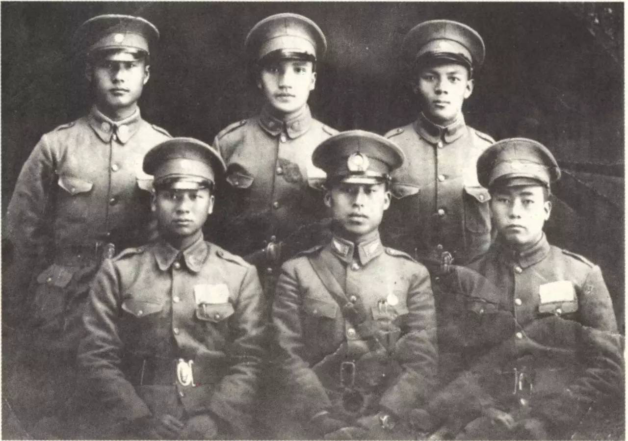 前列左より楊仲安、高志航、鄭少愚。二列目左より邵瑞麟、楽以琴、王世釋。